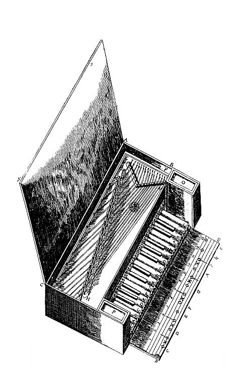 Une petite épinette - gravue illustrant l'Harmonie Universelle de Marin Mersenne (1636)